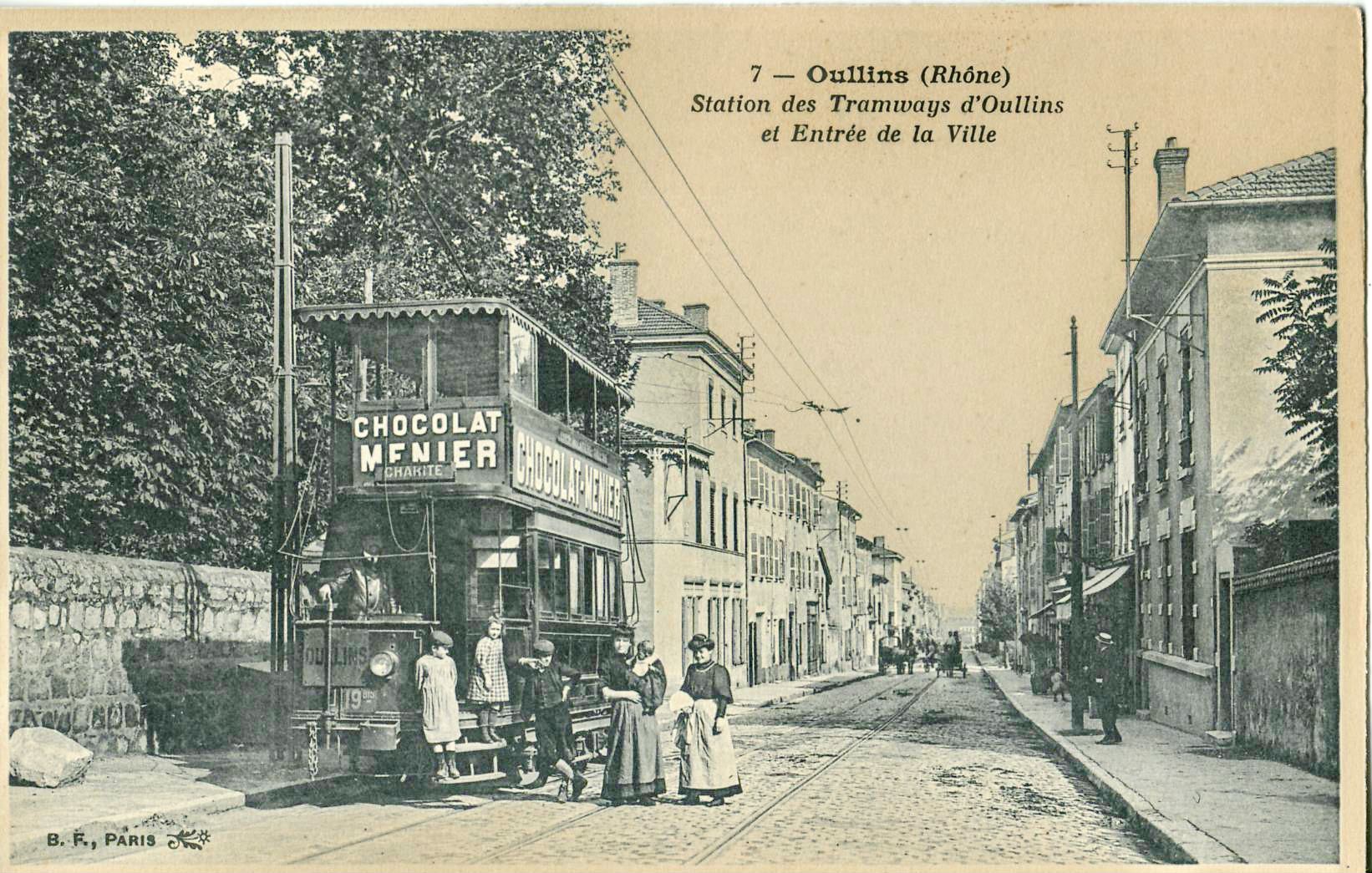 Carte postale ancienne éditée par BF à Paris, n°7 : OULLINS - Station des tramways d'Oullins et Entrée de la Ville